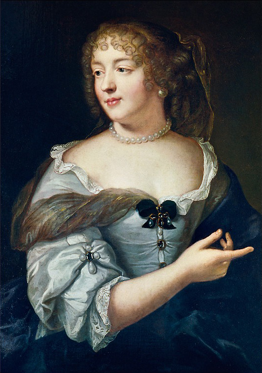 Portrait Marie de Rabutin-Chantals, Marquise de Sévigné